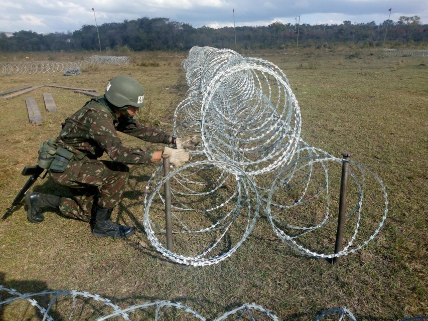 Engenharia da ESA